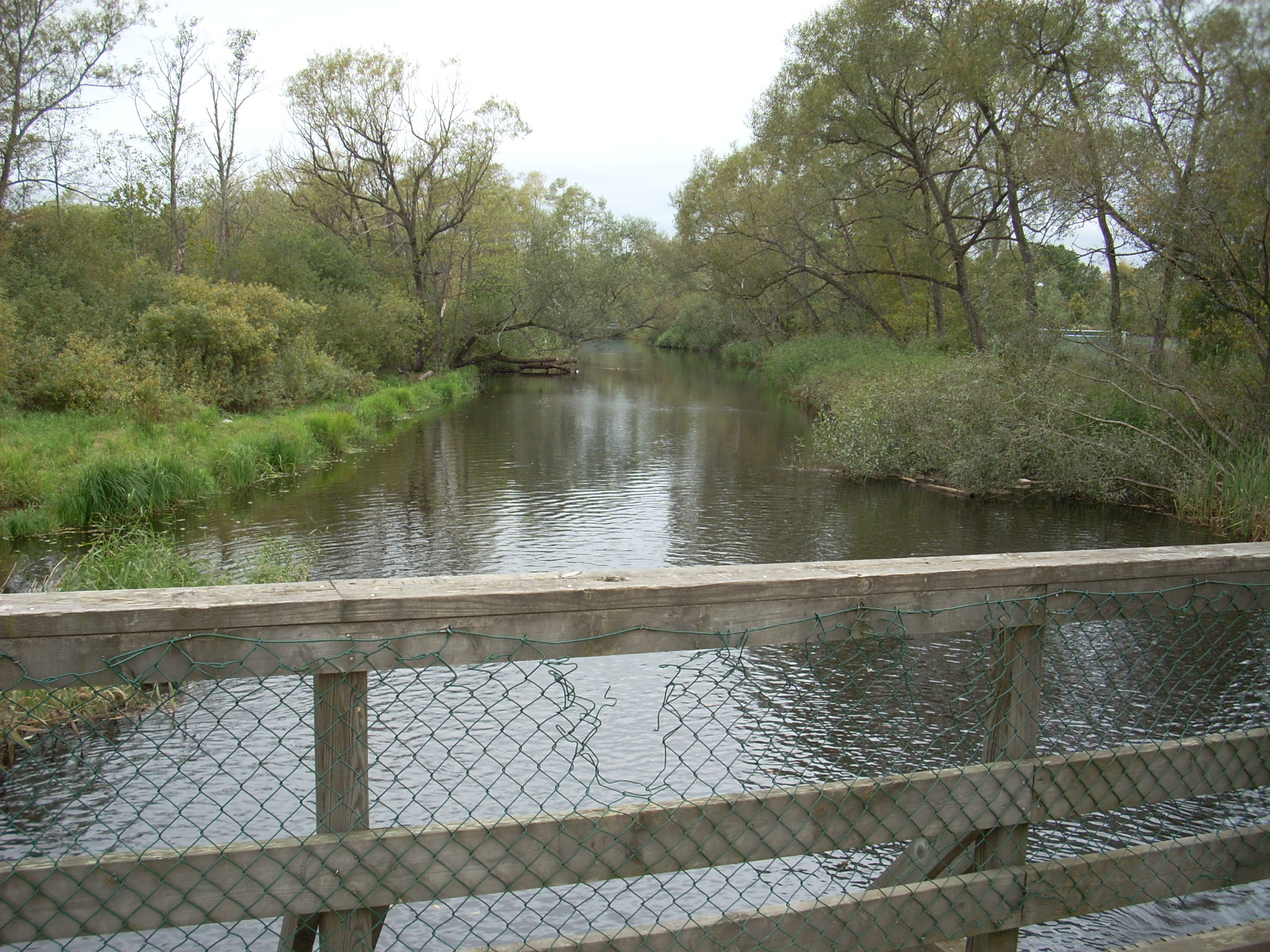 Huskvarnaån, i centrala Huskvarna. Fotot är taget västerut (nedströms) från Brooklyn-bron mellan Vapenvallen och Husqvarnafabriken.